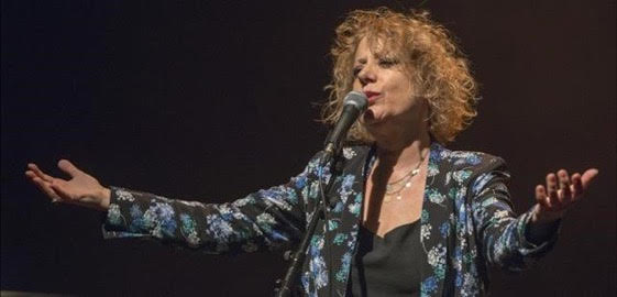 Marina Rossell a Barcelona 2016